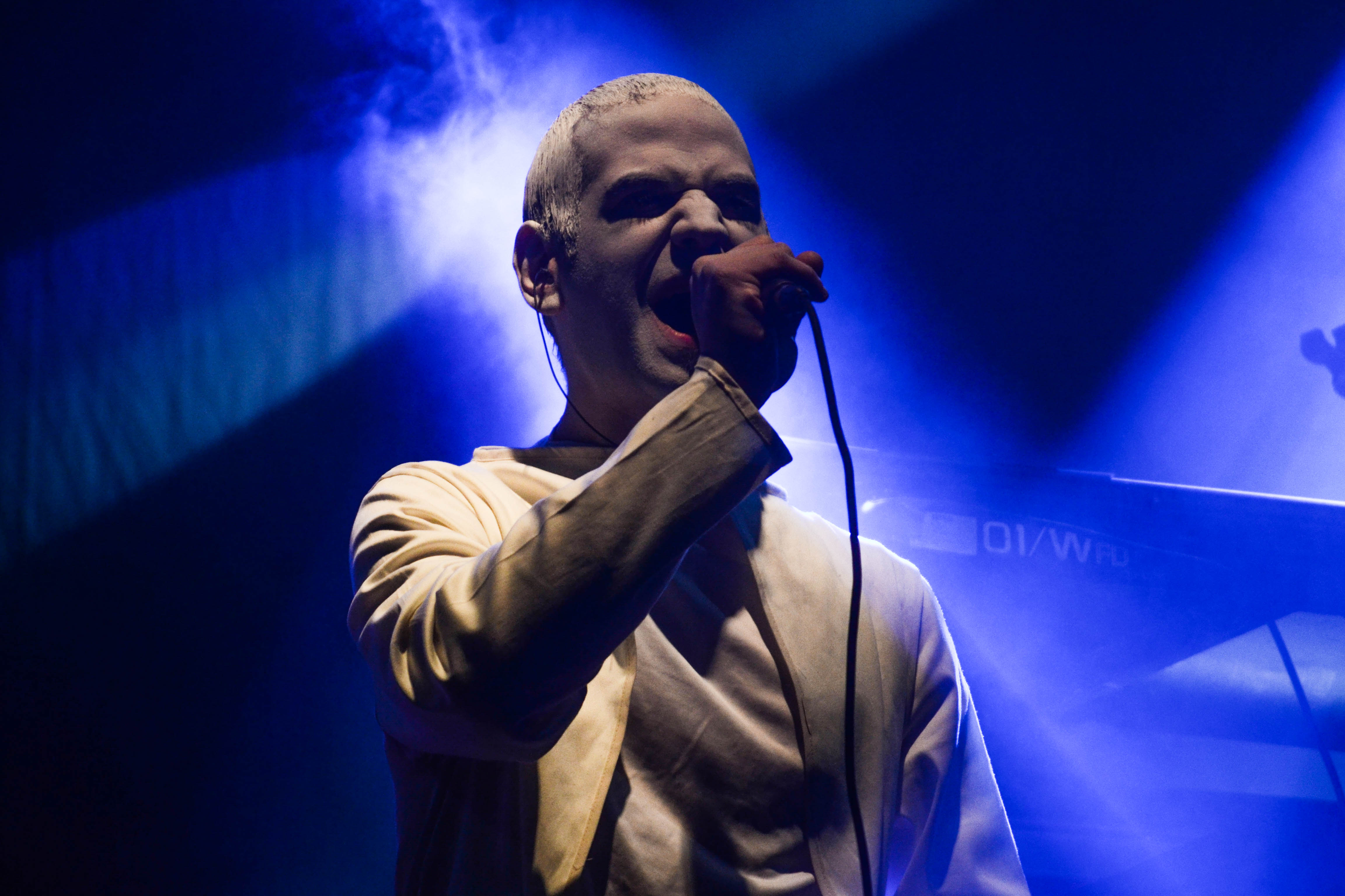 Gustavo Tavo Cortés: voz y teclados de Sig Ragga, banda argentina de reggae fusión formada en la ciudad de Santa Fe